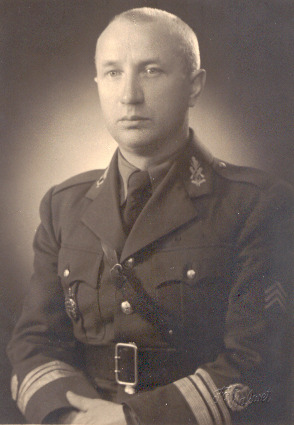 Kolonelleitnant Paul Villemi (aastatel 1939-1940)